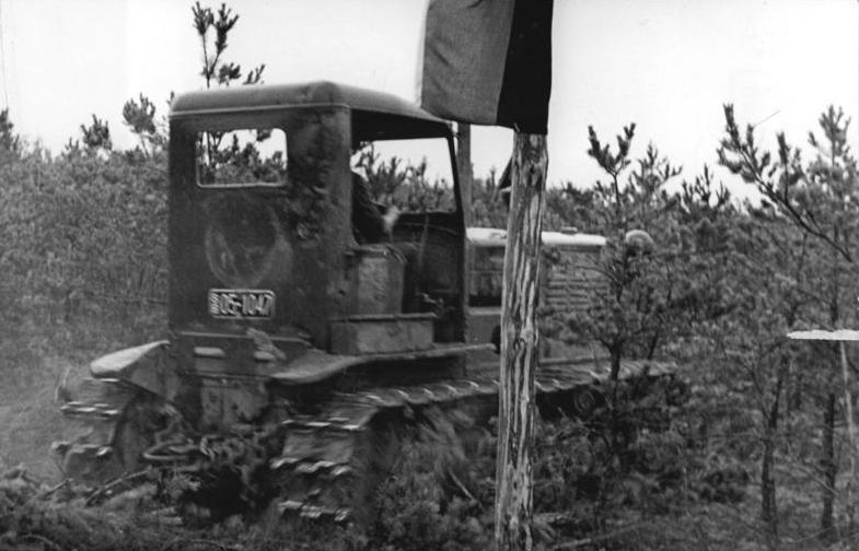 Rodung Aufn.: Illus Quaschinsky 5 T 019 B Neues Eisenhüttenkombinat für die DDR. Zwischen Fürstenberg und Schönfliess wurde heute auf dem Bauplatz des Eisenhüttenkombinates Ost in Anwesenheit von Industrieminister Selbmann und Ministerpräsident Jahn (Brandenburg) die Abholzung des vorgesehenen Geländes in Angriff genommen. UBz: Ein Traktor walzt auf dem Bauplatz die erste Bresche ins Gehölz.